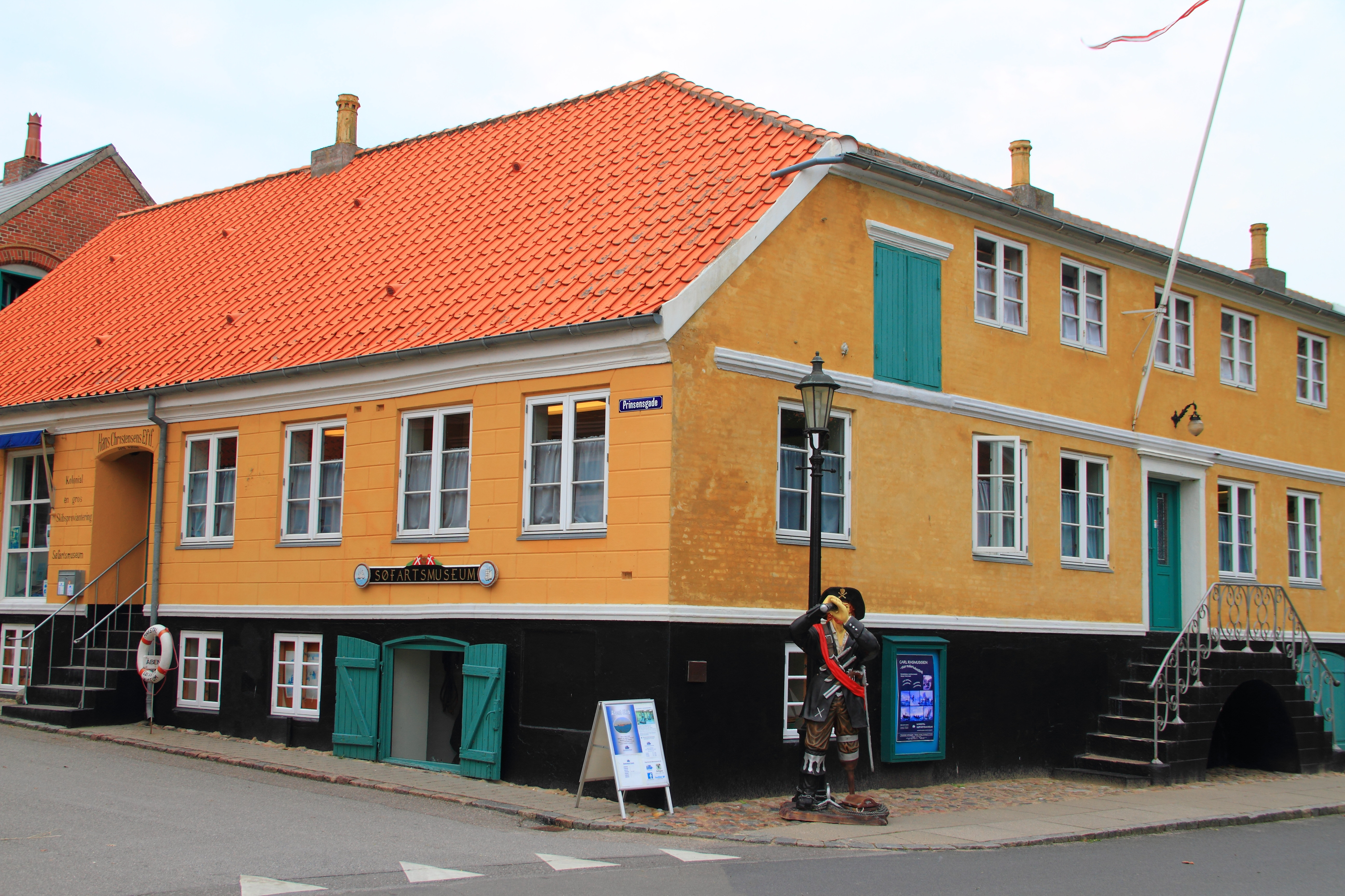 Das Schifffahrtsmuseum in der dänischen Gemeinde Marstal.